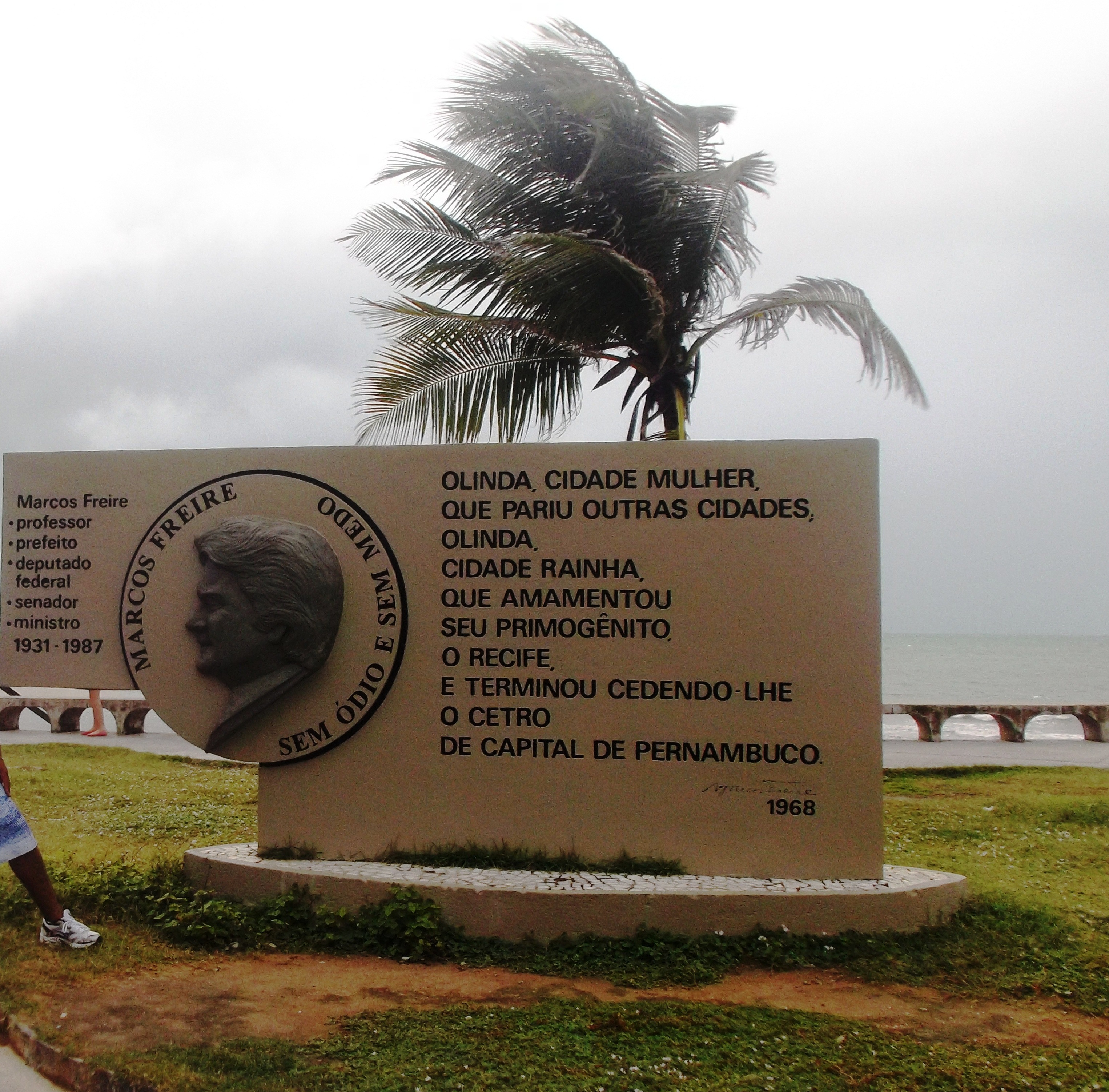 Memorial Efígie de Marcos Freire em Pernambuco